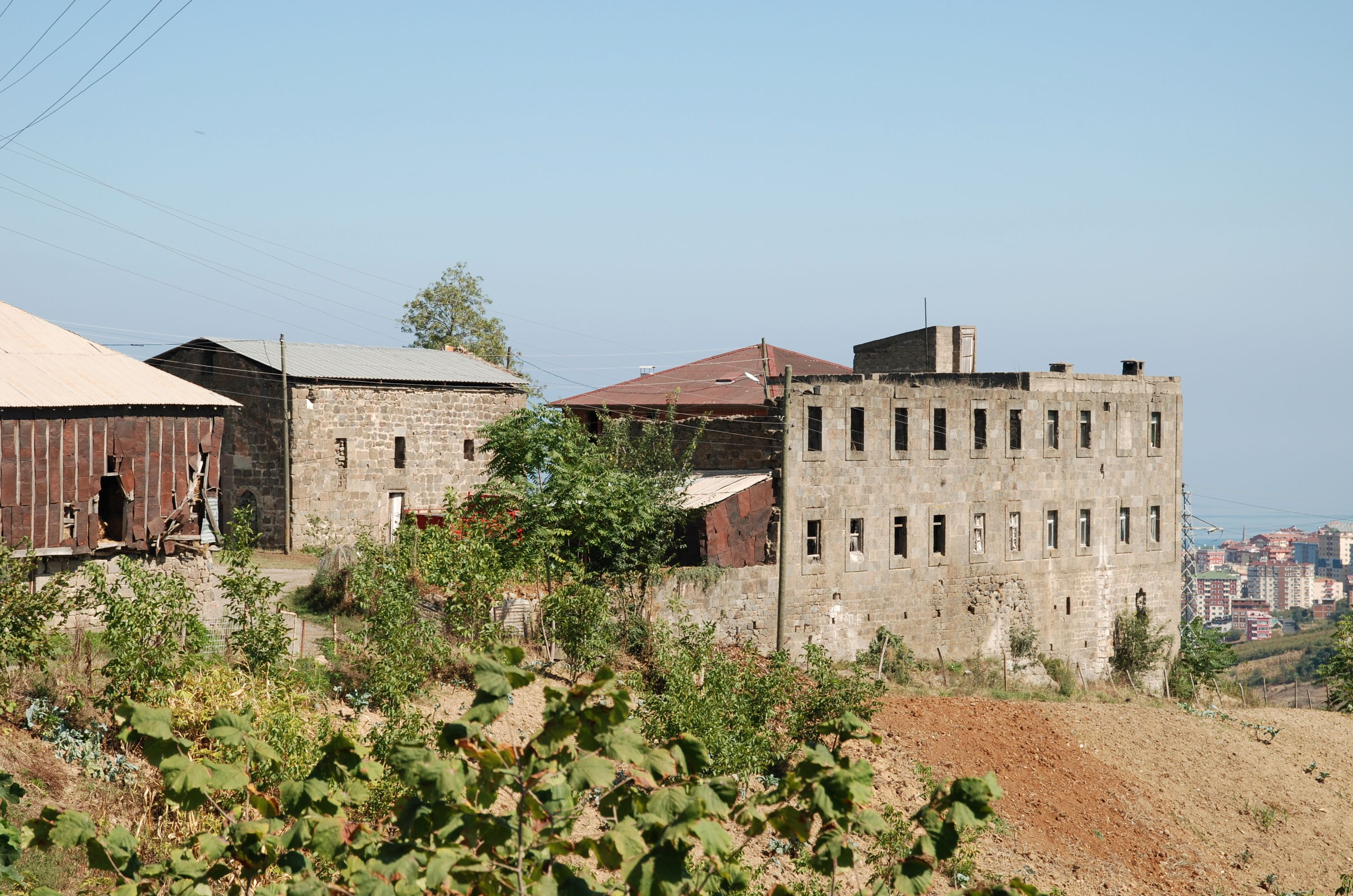 Kaymakli monastery